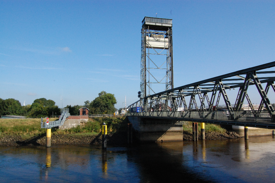 Blick auf die Huntebrücke (Hubbrücke Huntebrück) in Richtung Elsfleth